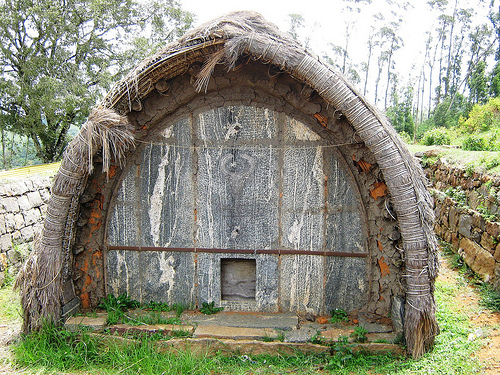 Ooty, Tamil Nadu, India.